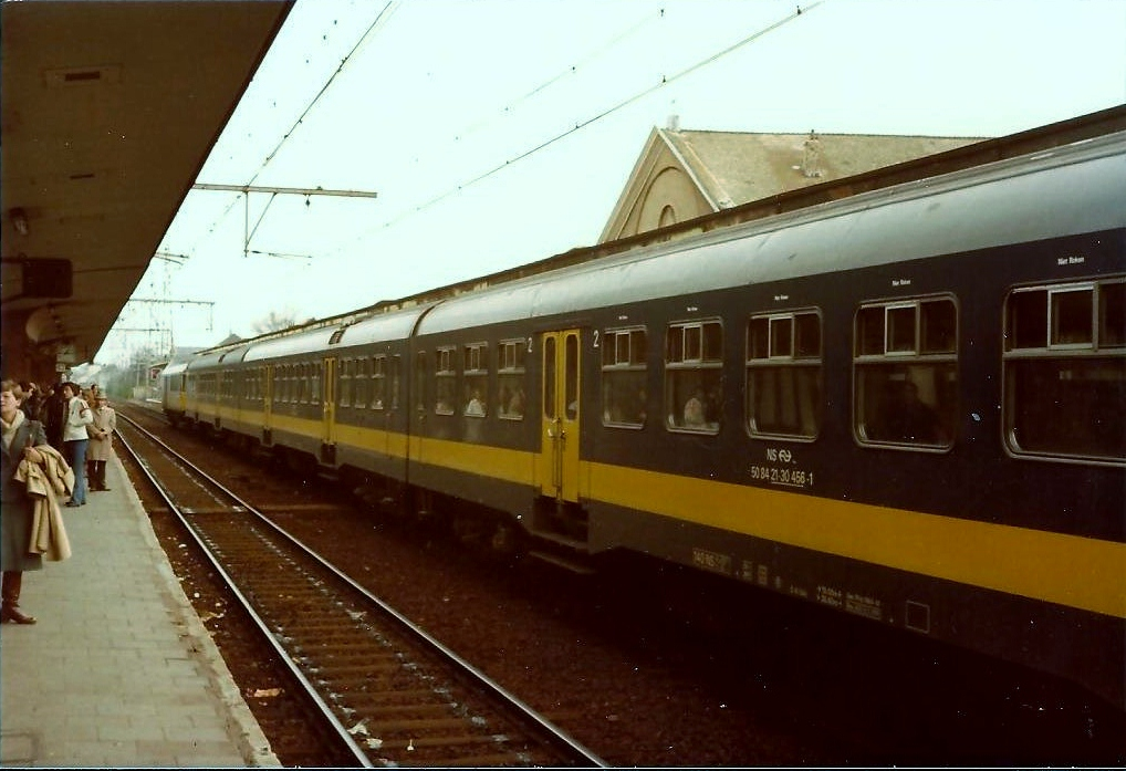 Blauwe getrokken Beneluxtrein met plan W in Brussel Noord